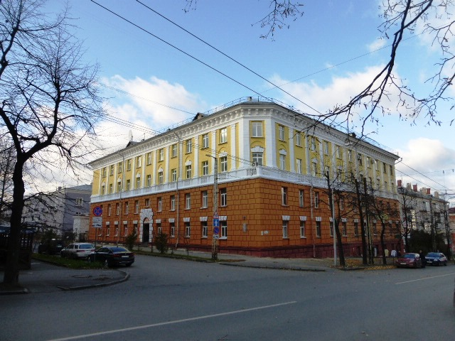 Здание бывшего штаба 22-ой воздушной армии (1954-1961) , затем штаба 5-й дивизии ПВО (1962-1985) в Петрозаводске. В настоящее время размещаются некоторые исполнительные органы федерального и республиканского подчинения. (перекрёсток ул. Куйбышева/Свердлова)